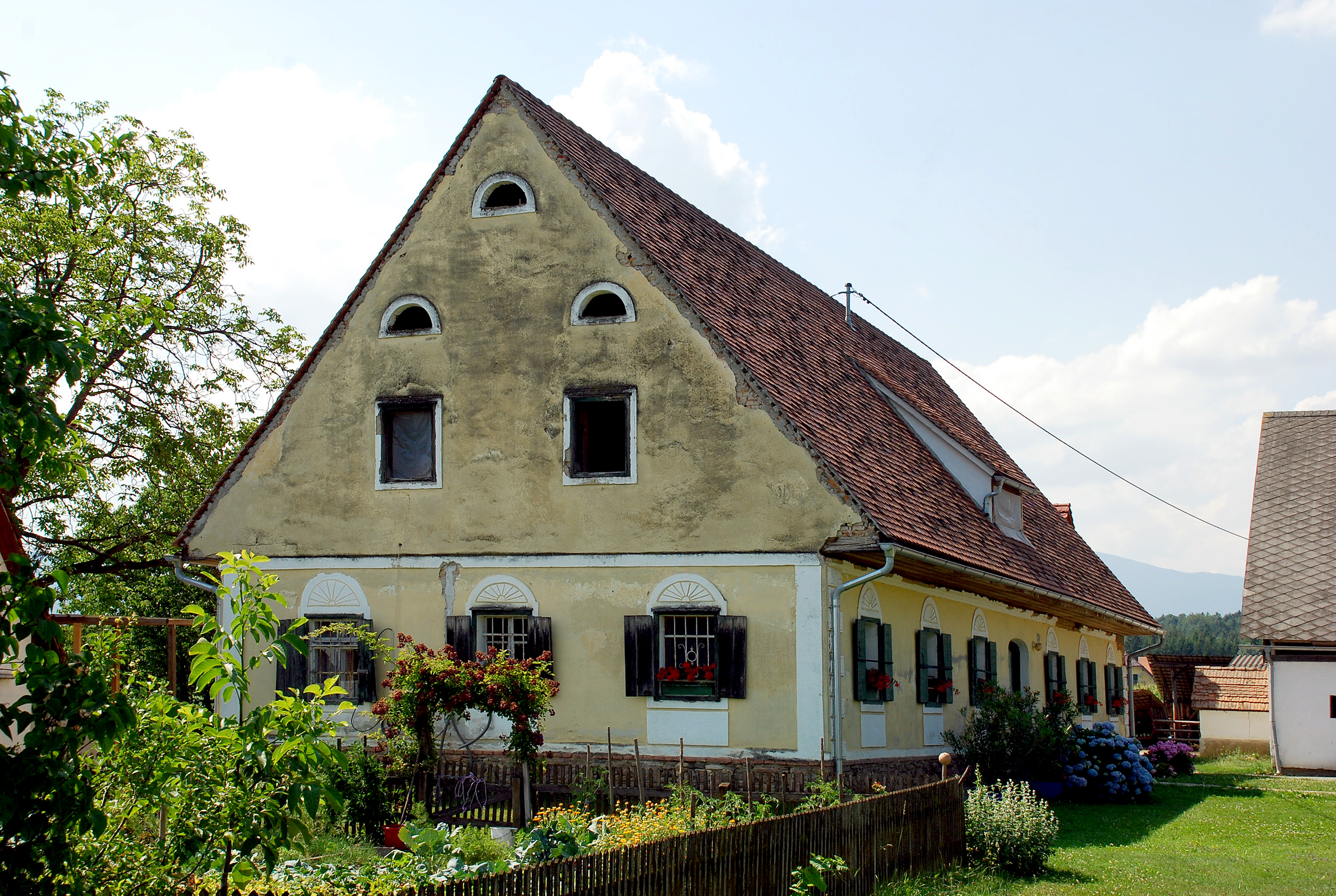 Frauental, Steiermark, Österreich: denkmalgeschütztes Bauernhaus im Norden des Ortes